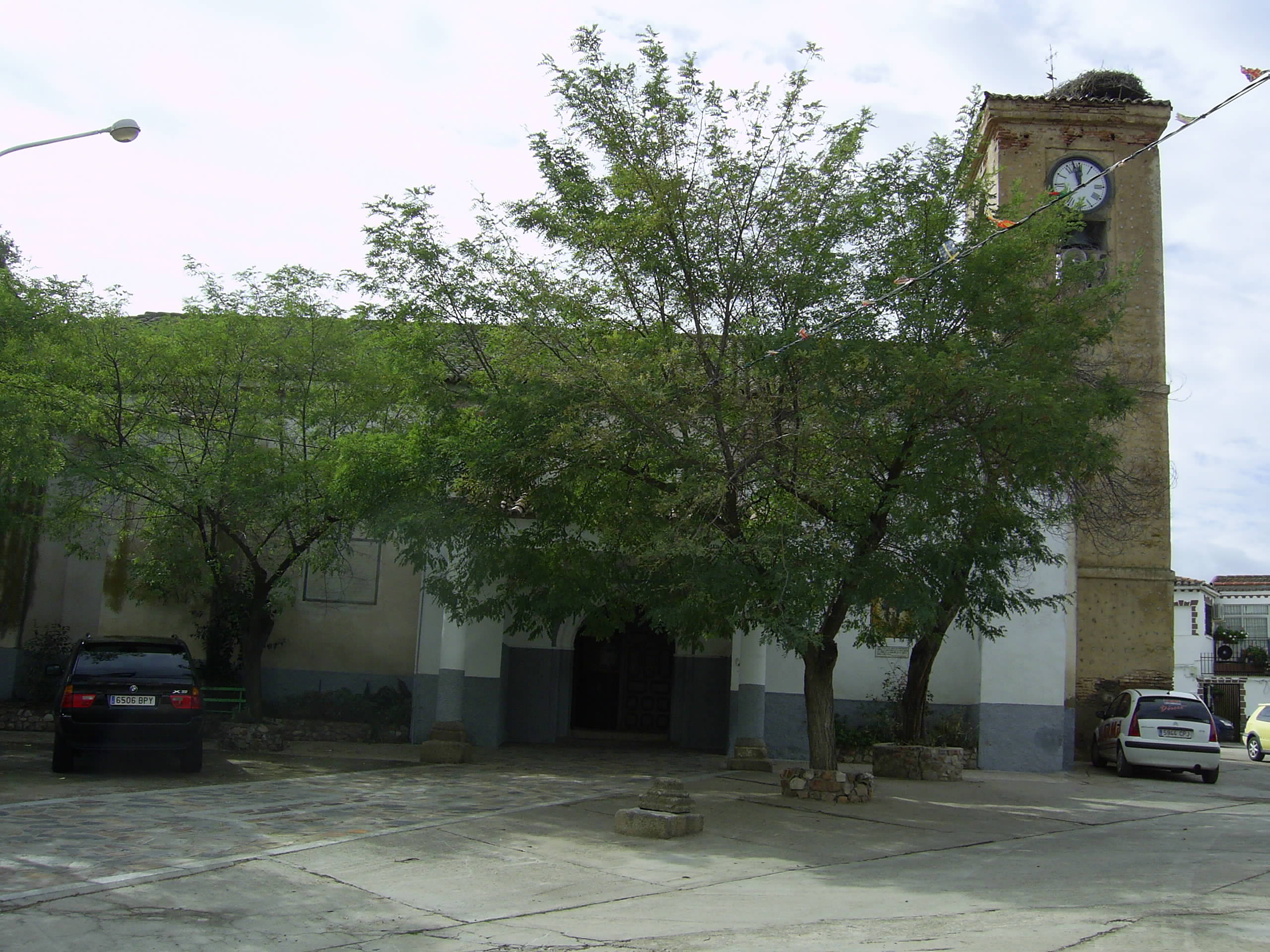 Iglesa de Carrascalejo